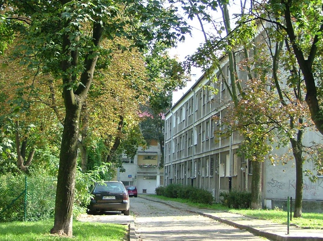 PL, Warsaw, Poland, Praga Południe, Grochów, ul. Garwolińska, Osiedle Młodych